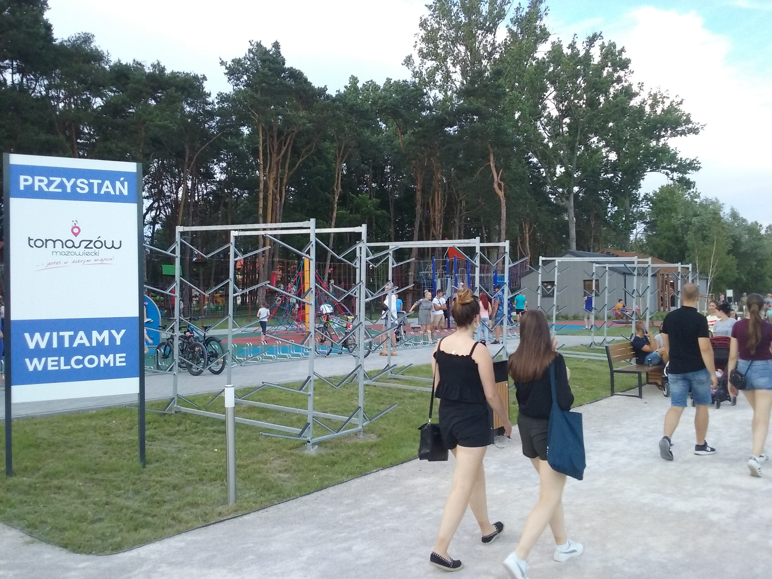 Przystań nad Pilicą w Tomaszowie Mazowieckim